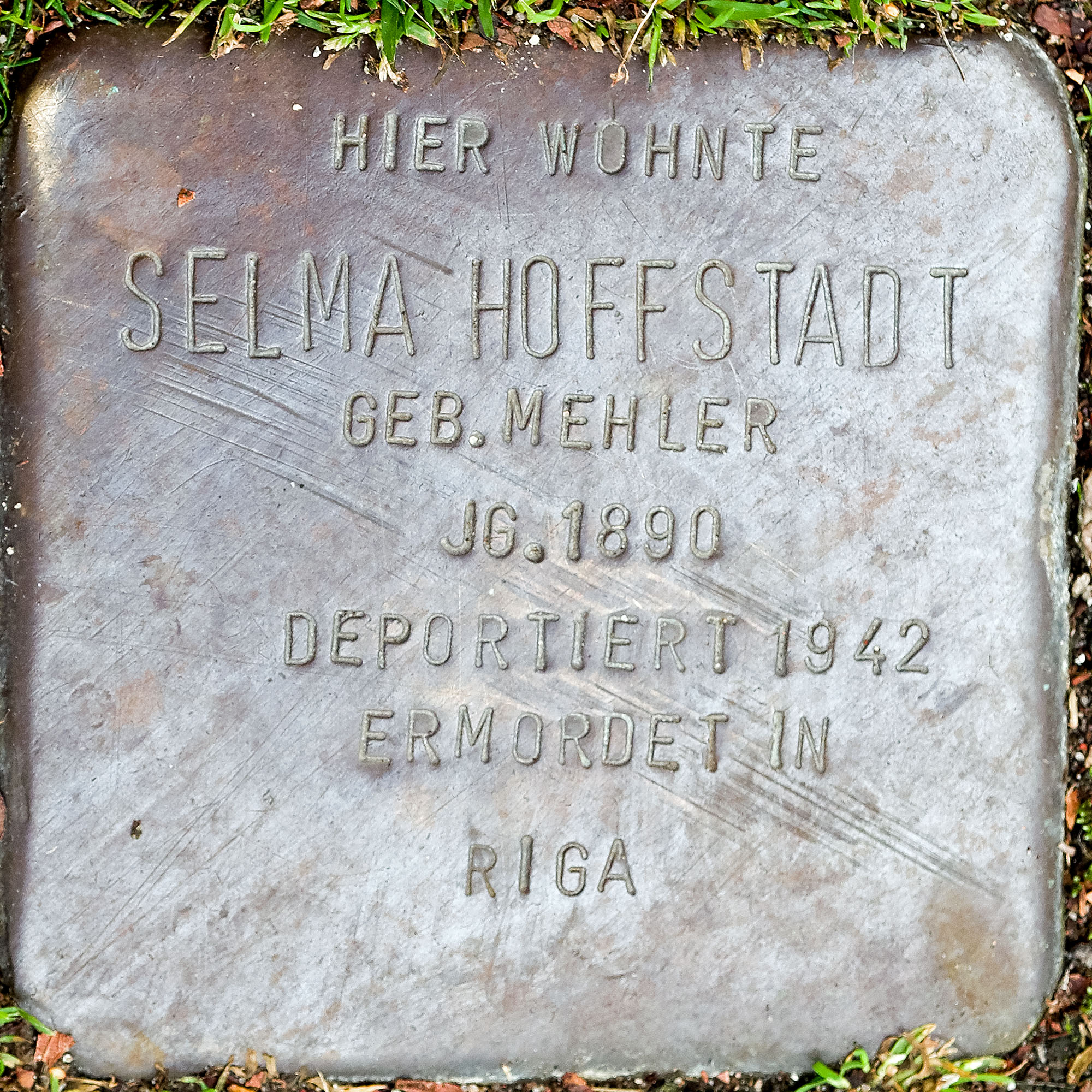 Stolpersteine in Viersen: Hoffstadt, Selma